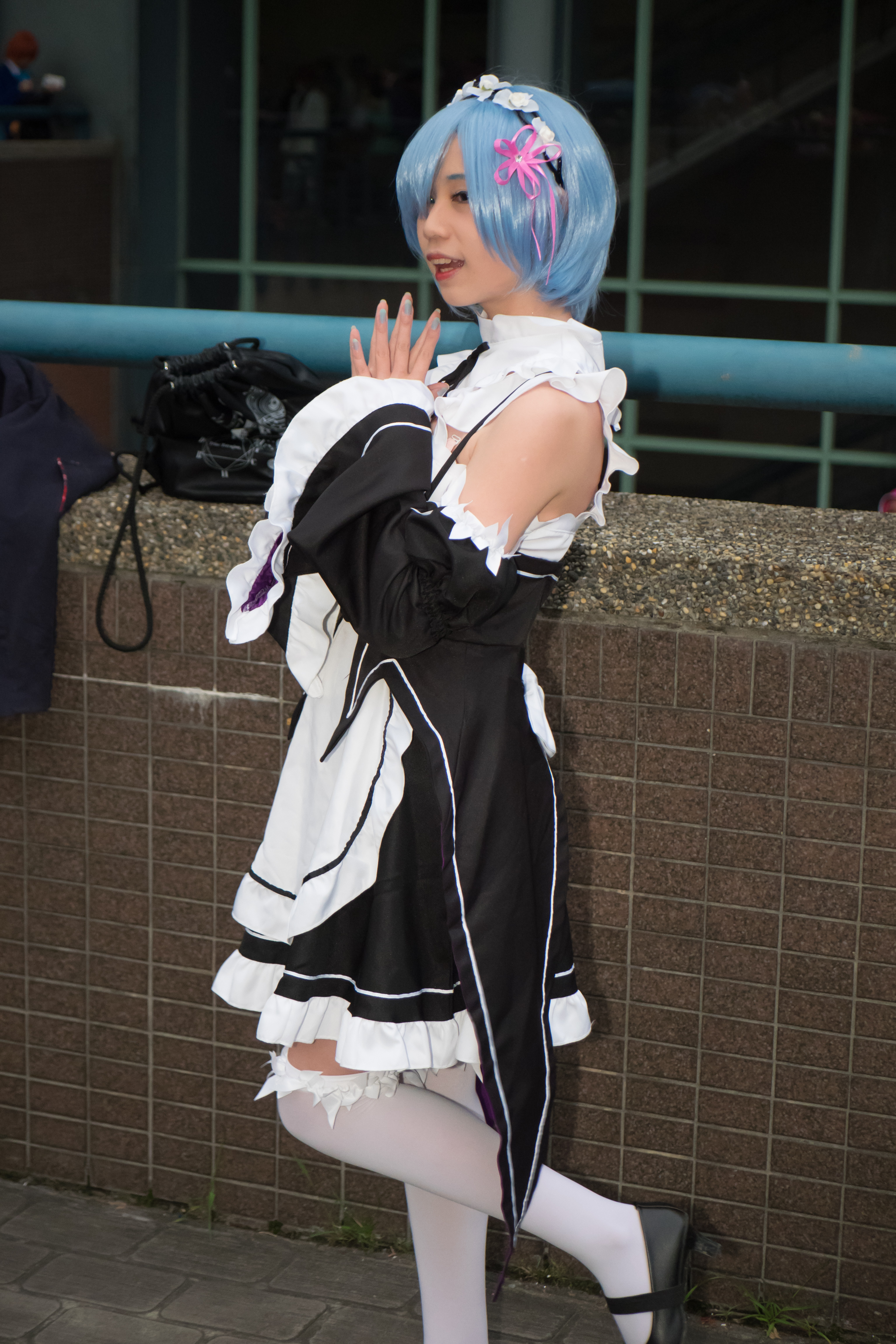 第44屆台灣同人誌販售會，《Re:從零開始的異世界生活》雷姆cosplayer。